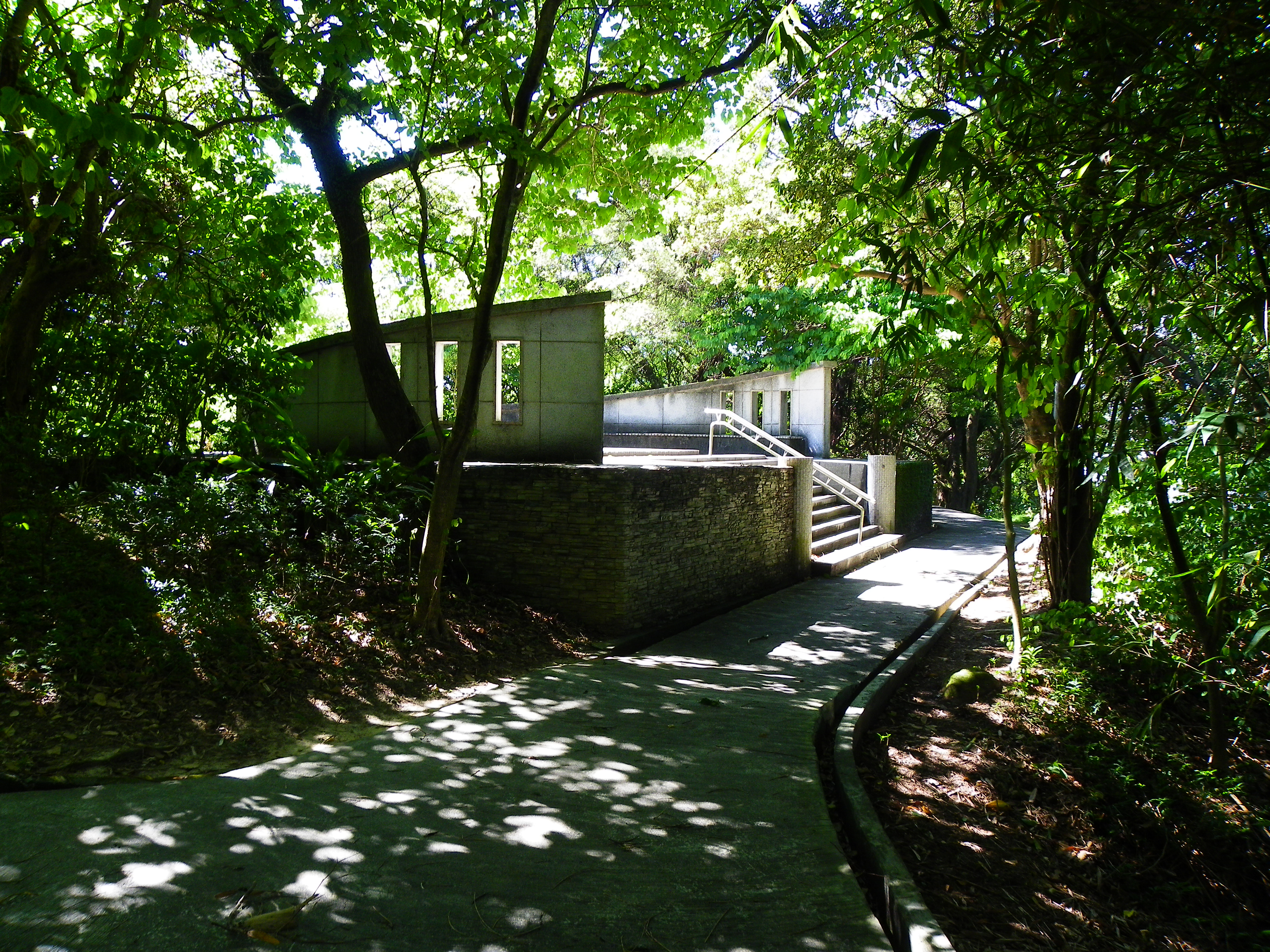 胡適公園後山的吳大猷先生紀念碑遠景。